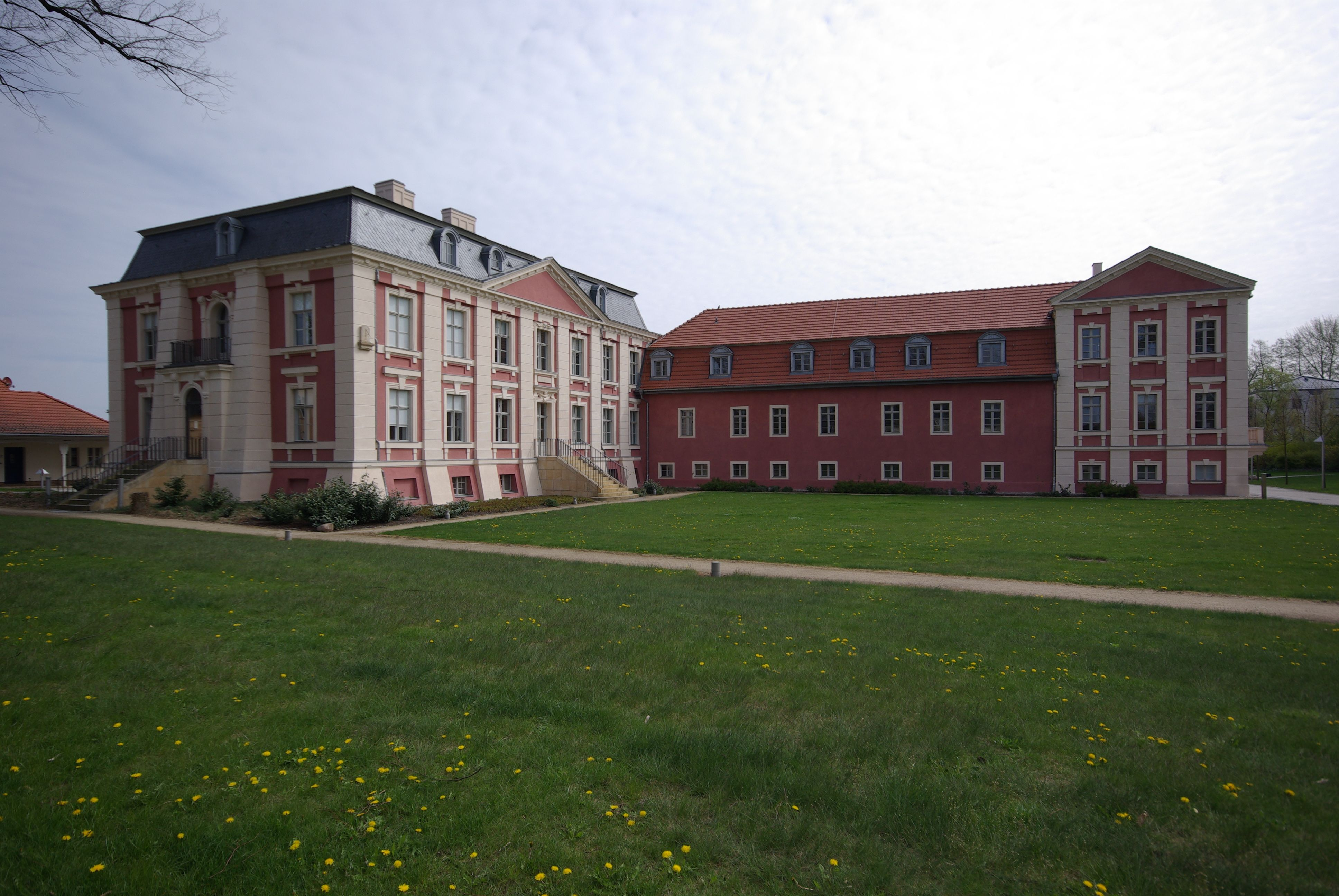 Werder (Havel) in Brandenburg. Das Gutshaus im Ortsteil Plessow steht unter Denkmalschutz.